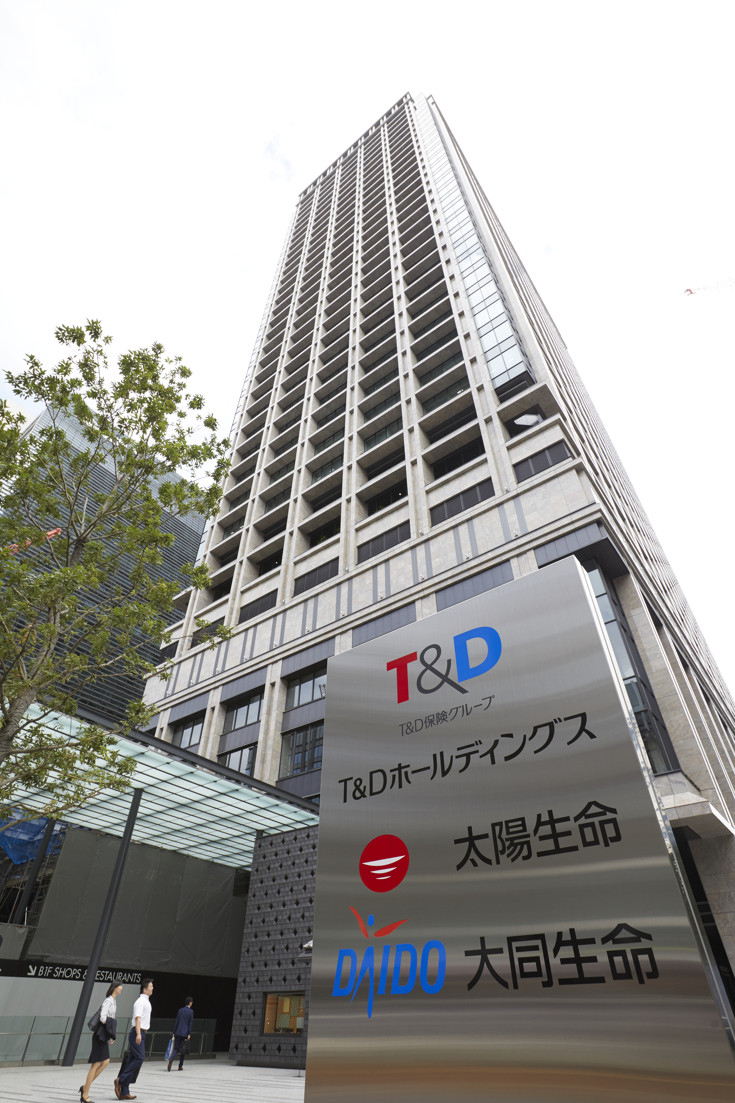 （株）T&Dホールディングス本社が入居する東京日本橋タワー